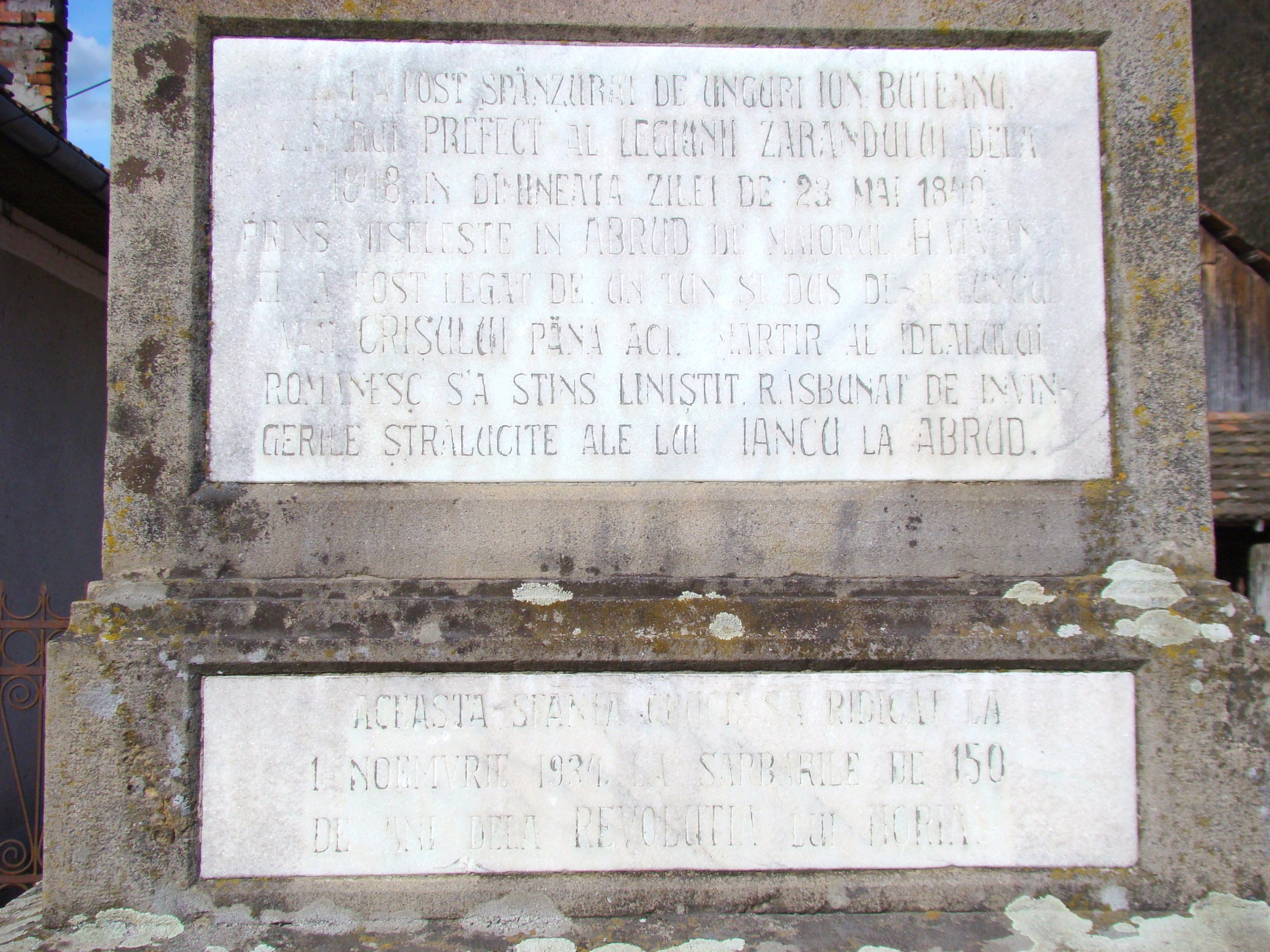 Troiţa lui Ioan Buteanu, strada Iosăşel, sat GURAHONŢ